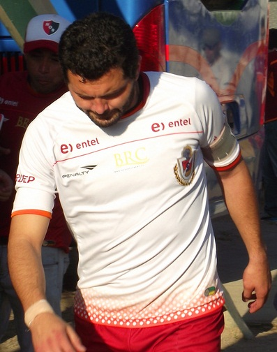 Mauricio Salazar en la previa del partido de La Serena-Cobresal por Copa Chile en Vallenar